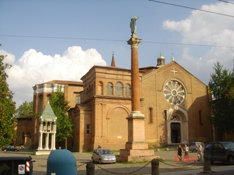 Chiesa di San Domenico Bologna